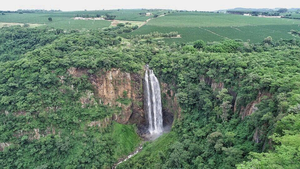 Cachoeira Cascata Grande - Maior queda d'água livre do estado de São Paulo.